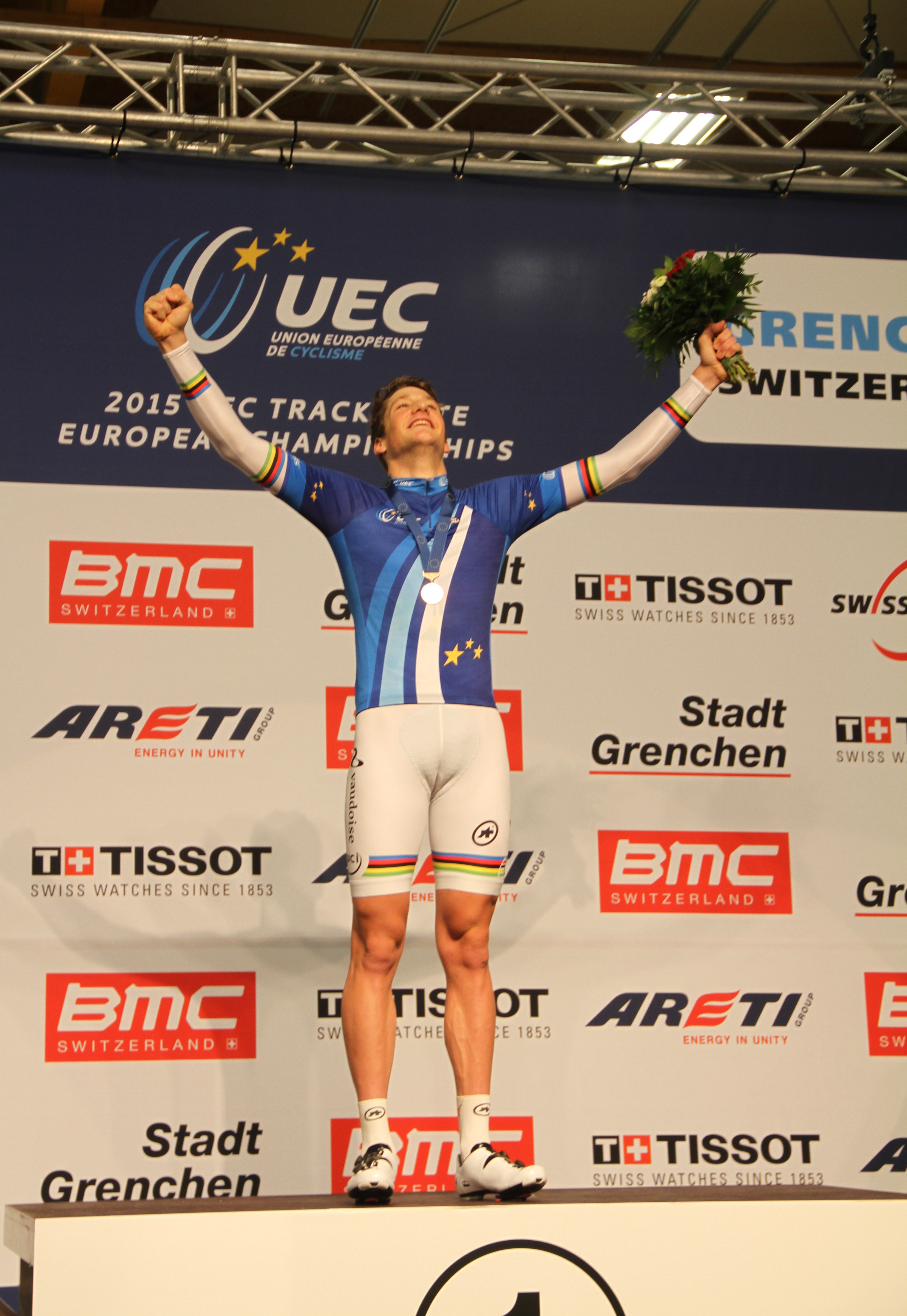 Stefan Küng, Schweizer Radsportler, Europameister in der Einerverfolgung The making of this document was supported by the Community-Budget of Wikimedia Germany.